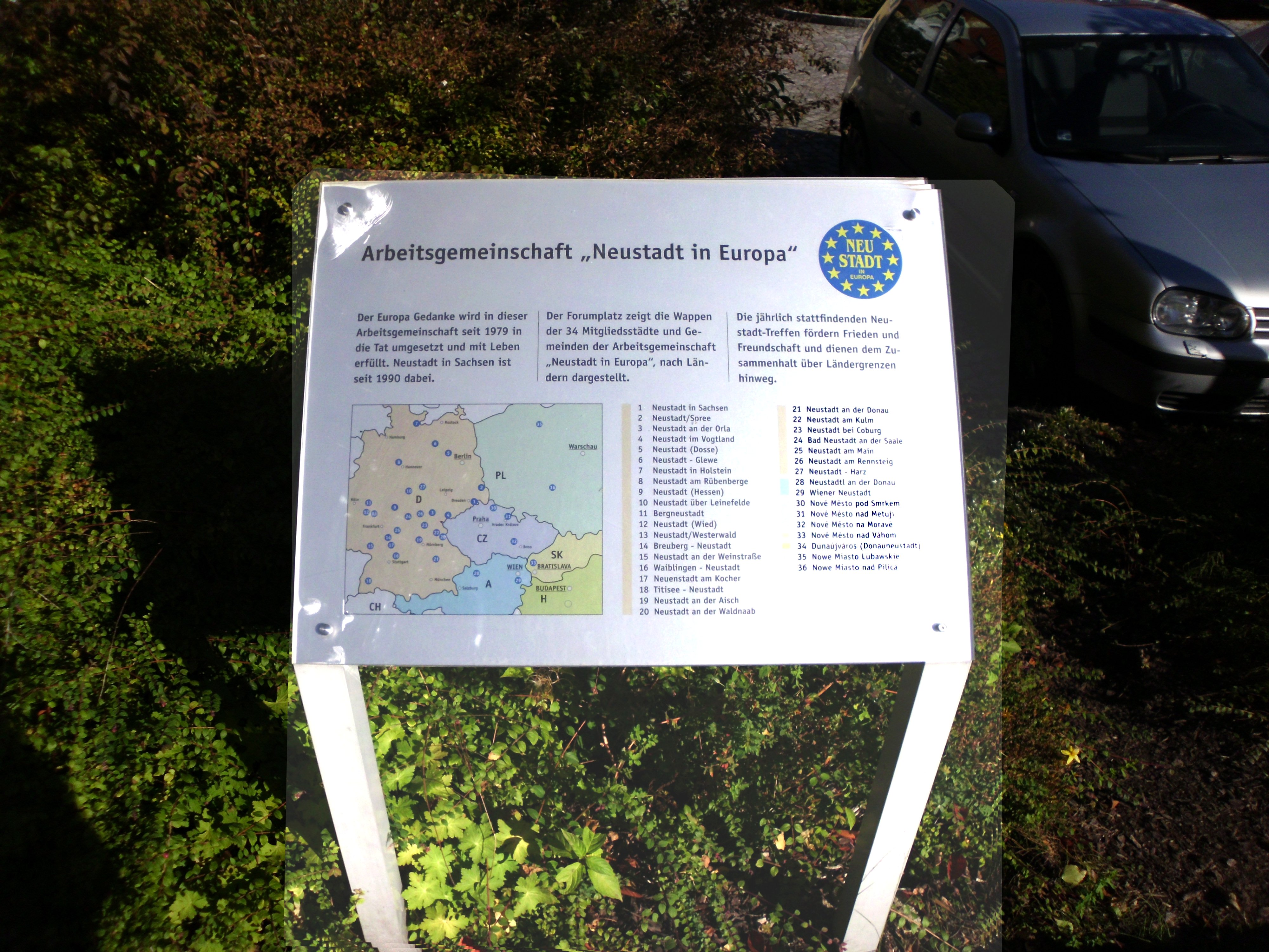 Infotafel zu den eingelassenen Steintafeln der Neustadts in Europa in Neustadt in Sachsen Unknown